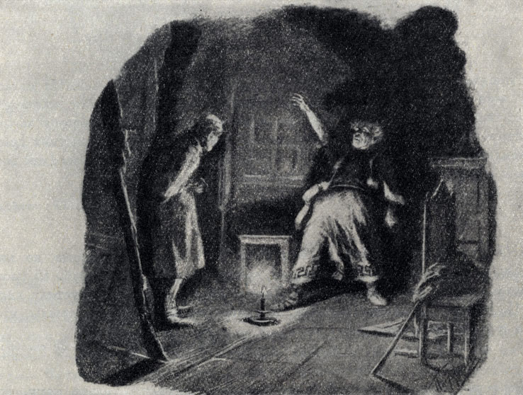 Лебединая песня. Рисунок Л. О. Пастернака, 1895